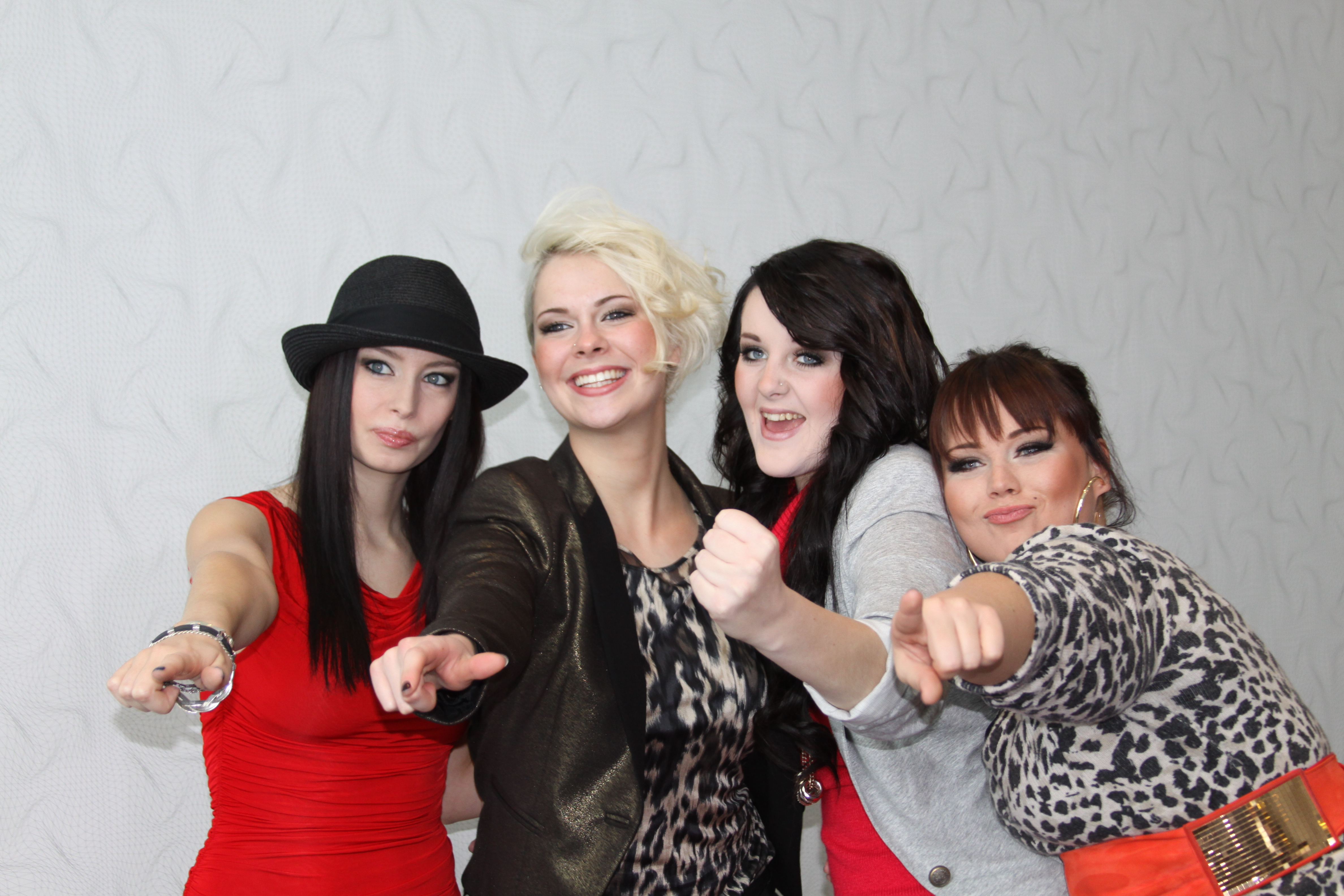 LaVive in Köln nach der dritten Liveshow von Popstars